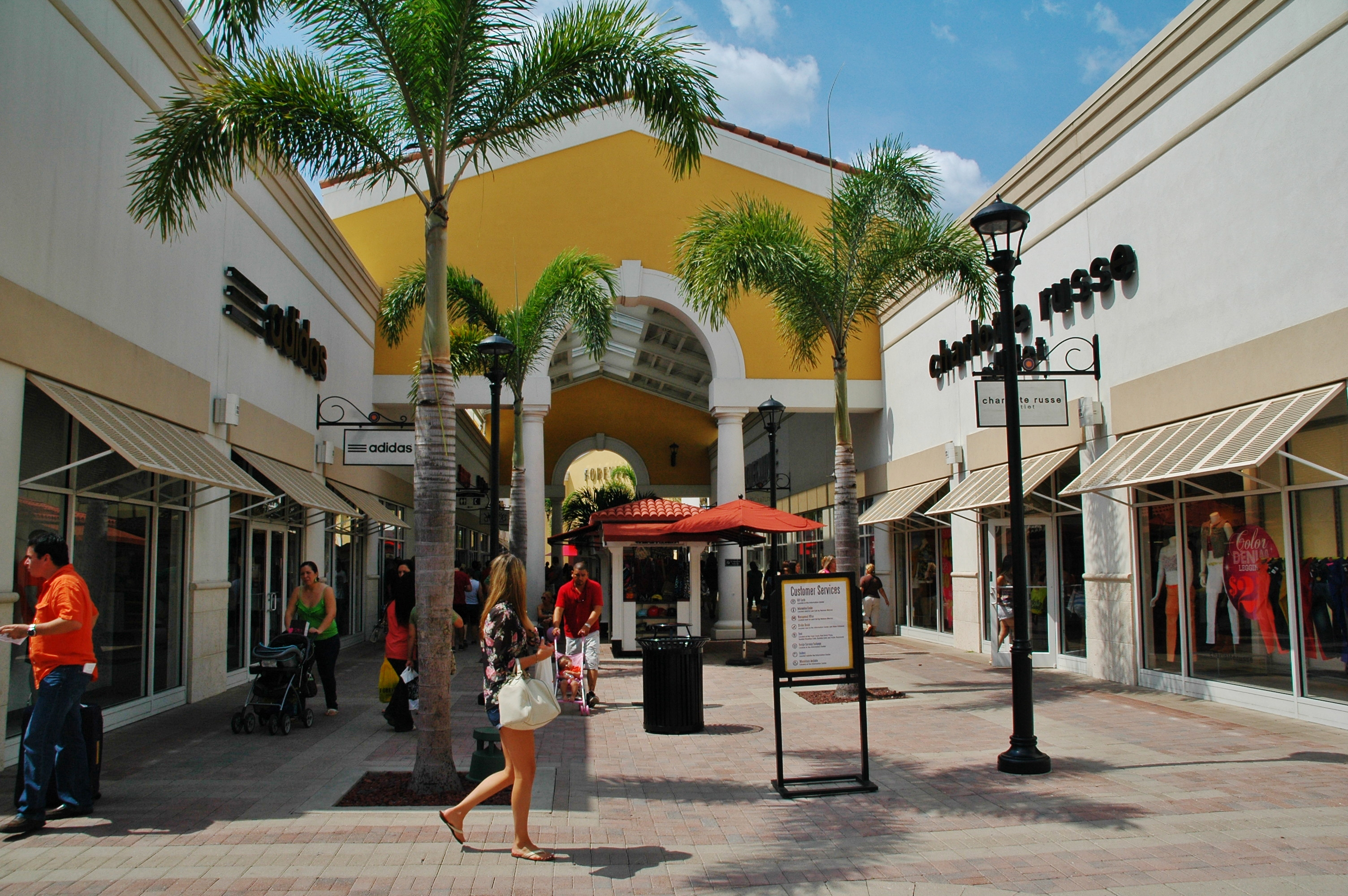 Orlando Premium Outlets